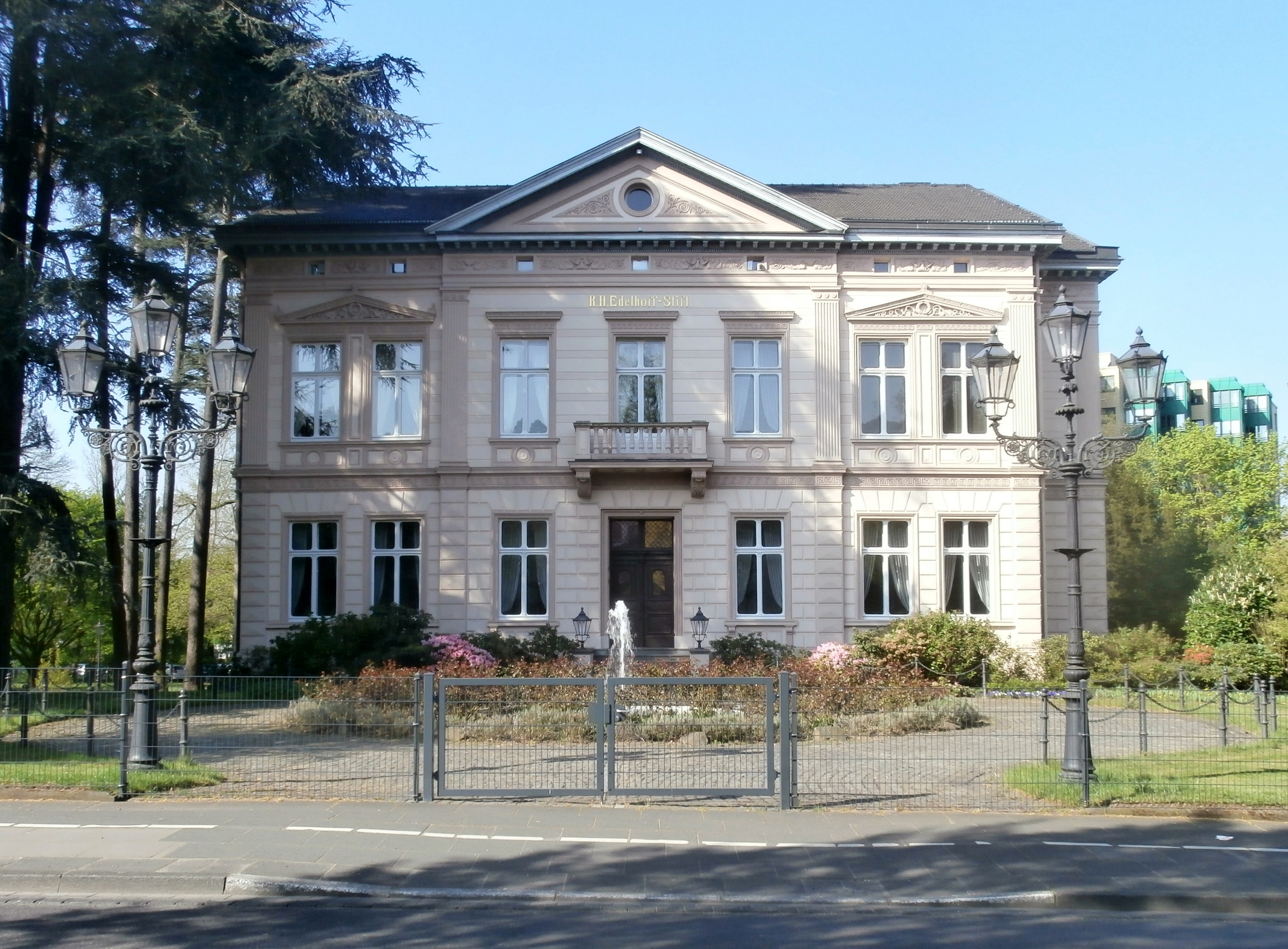 Edelhoff-Stift, Hauptstraße 8, Bad Honnef: Aufnahme von der Hauptstraße